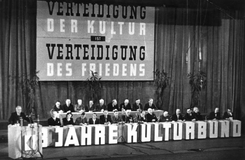 Berlin, Kundgebung des Kulturbundes ADN-Zentralbild Friedenskundgebung des Kulturbundes am 24.10.1948 in der Deutschen Staatsoper (Admiralspalast) in Berlin. Unter dem Motto "Verteidigung des Friedens ist Verteidigung der Kultur" treten namhafte Vertreter der Kultur- und Geistesschaffende auf und fordern, dem Krieg den Kampf anzusagen, damit der Frieden Wirklichkeit wird. U.B.z.: Die Eröffnung der Friedenskundgebung. 5050-50 Bannerinschrift im Hintergrund: „Verteidigung der Kultur ist Verteidigung des Friedens“ Inschrift am Tisch: „3 Jahre Kulturbund“